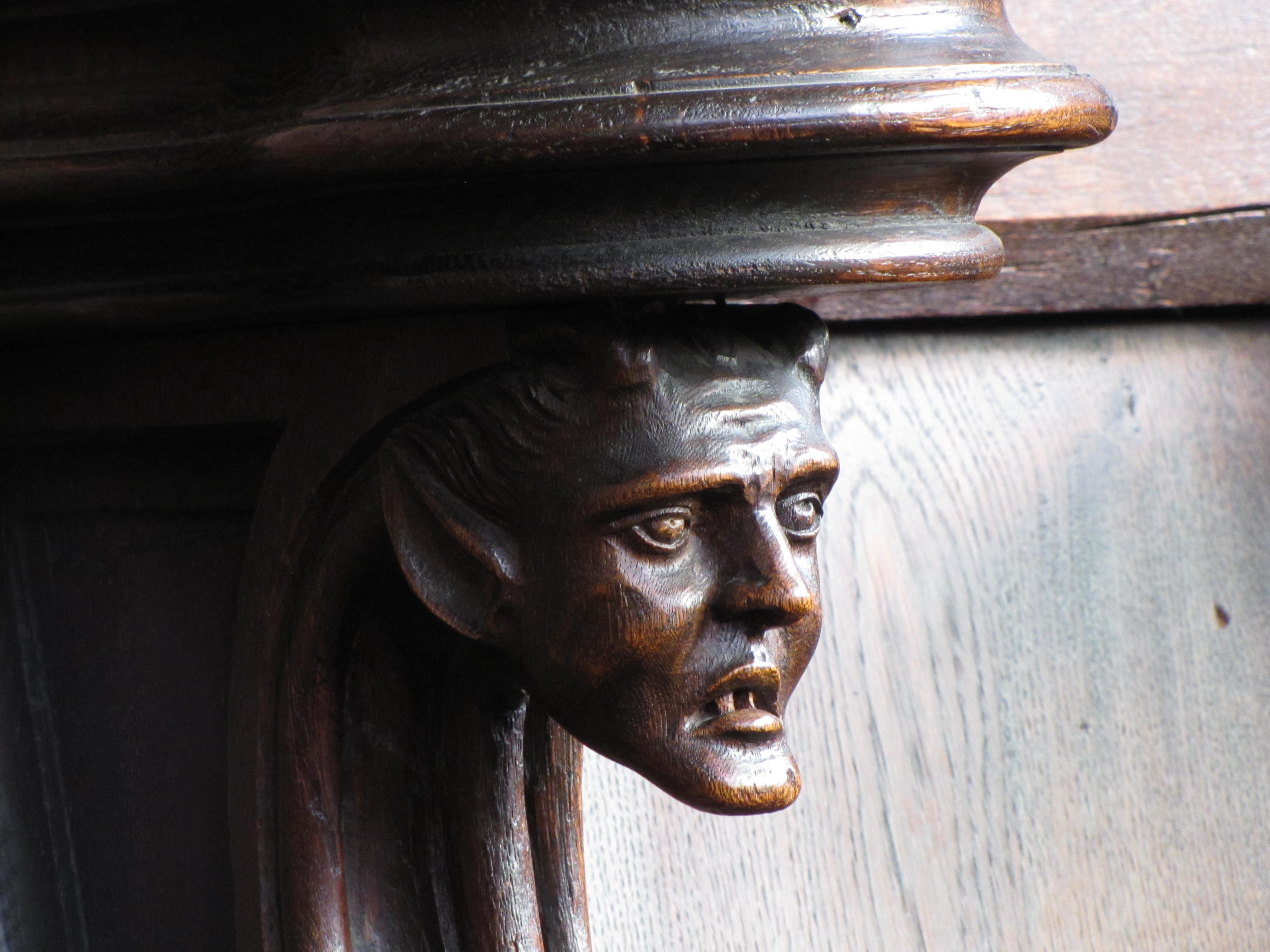 Alsace, Bas-Rhin, Sélestat, Église Saint-Georges (PA00084978, IA00124588). Détail d'une stalle de Klem : drôlerie sculptée sur l'accoudoir (1862)